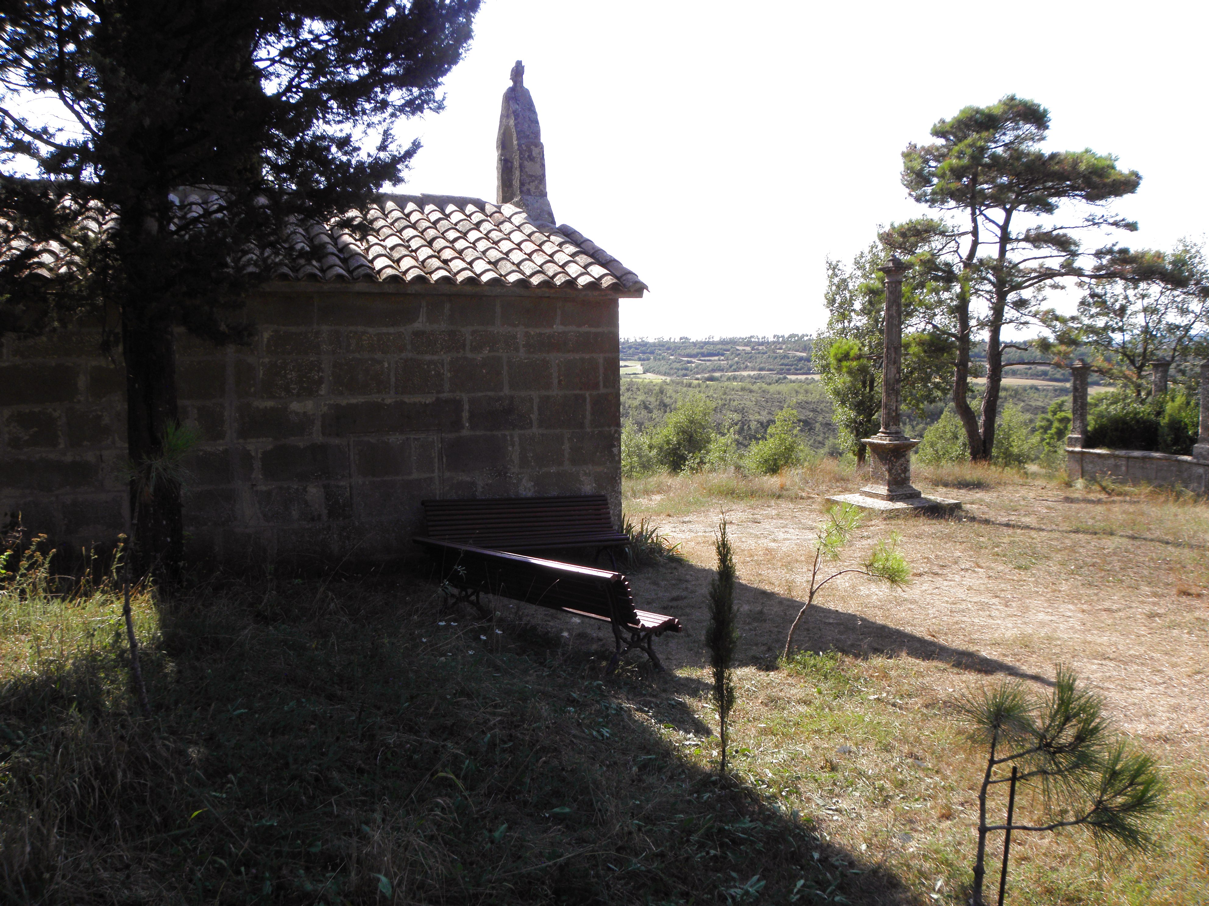 Els tres elements del conjunt de la capella de la Desaparició, al Santuari del Miracle (Riner, Solsonès)